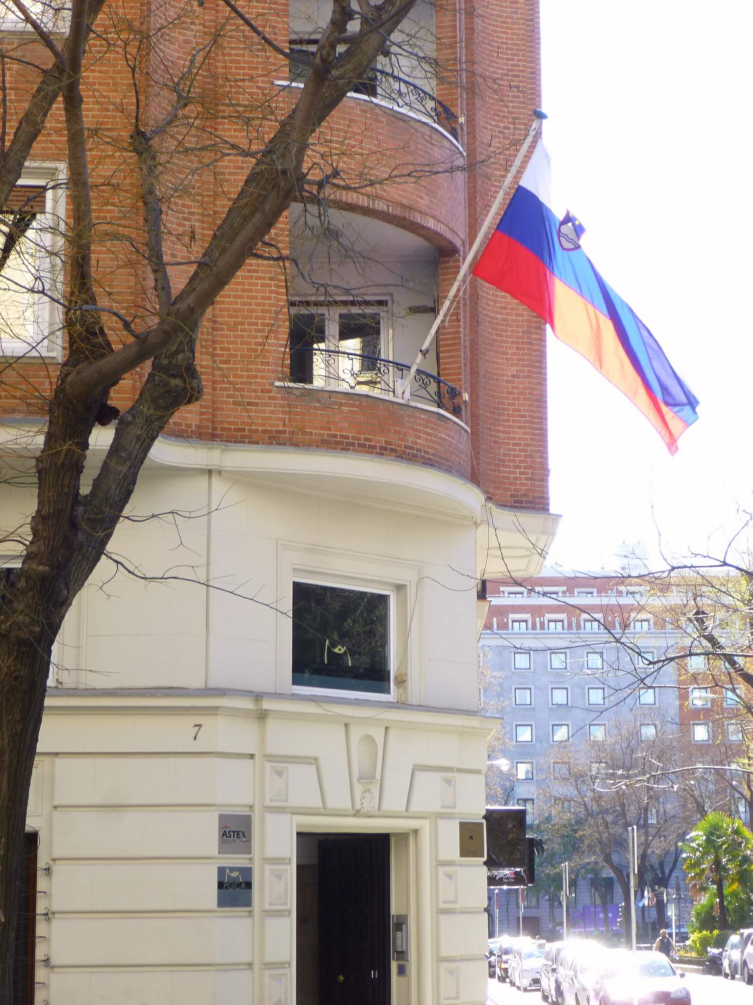 Madrid - Embajada de Eslovenia.